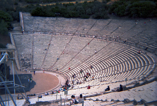 Theater von Epidaurus in Griechenland